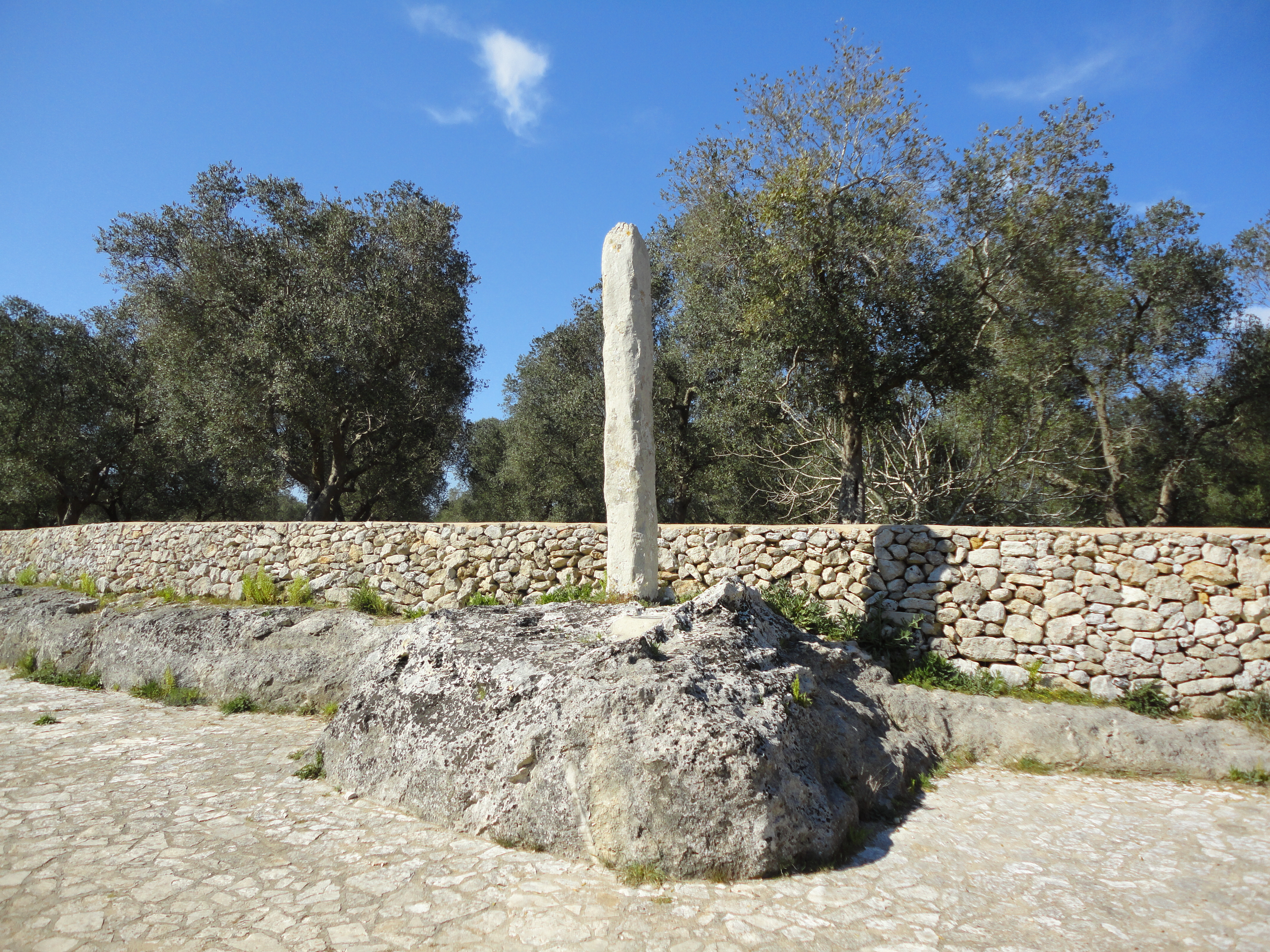 Menhir Vicinanze 2 Giurdignano